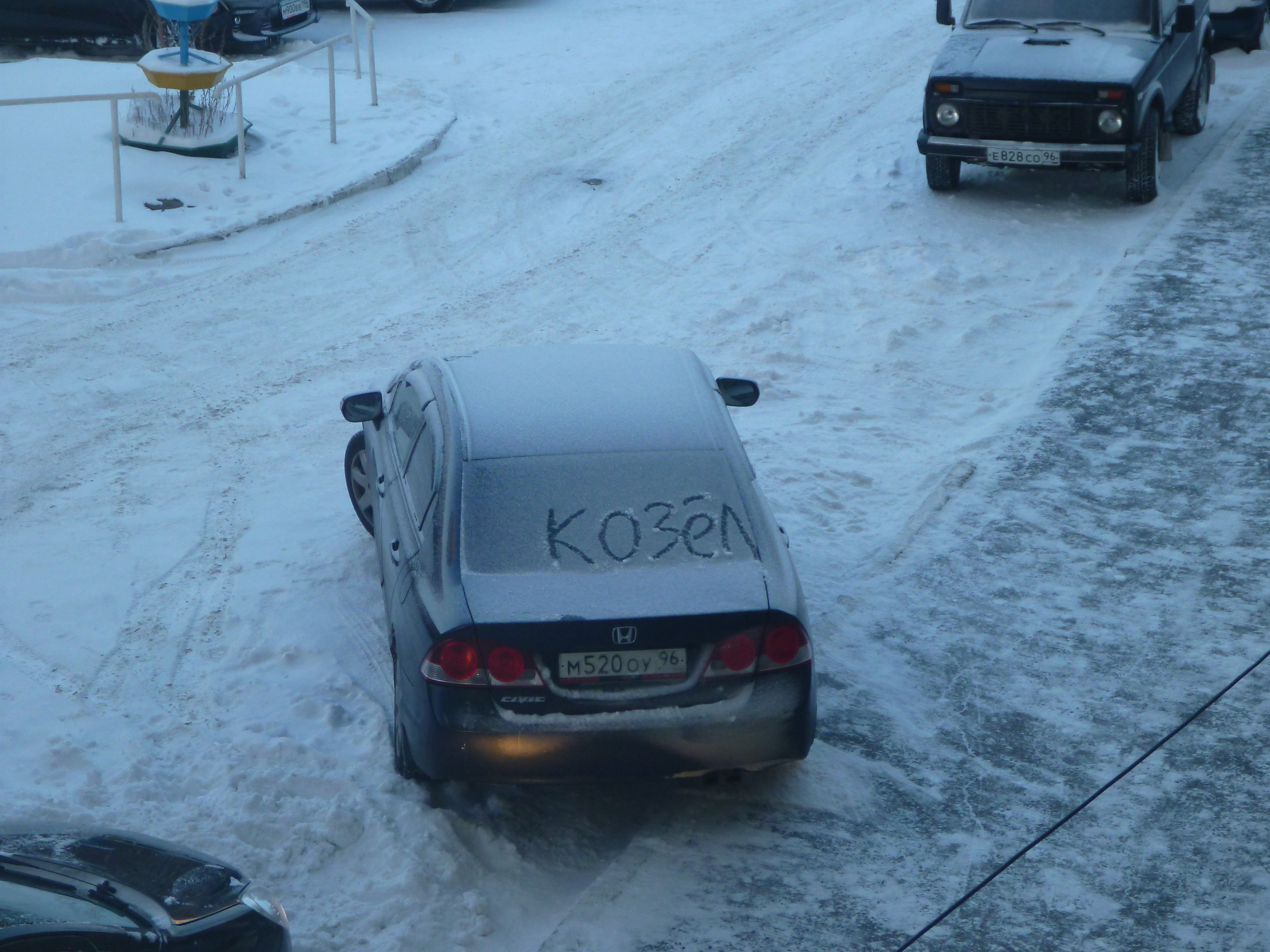 Надпись Козел оставленная соседкой водителя в Екатеринбурге (соседка не могла выехать на личной машите, так как ей мешала машина этого водителя) 22 декабря 2019 года